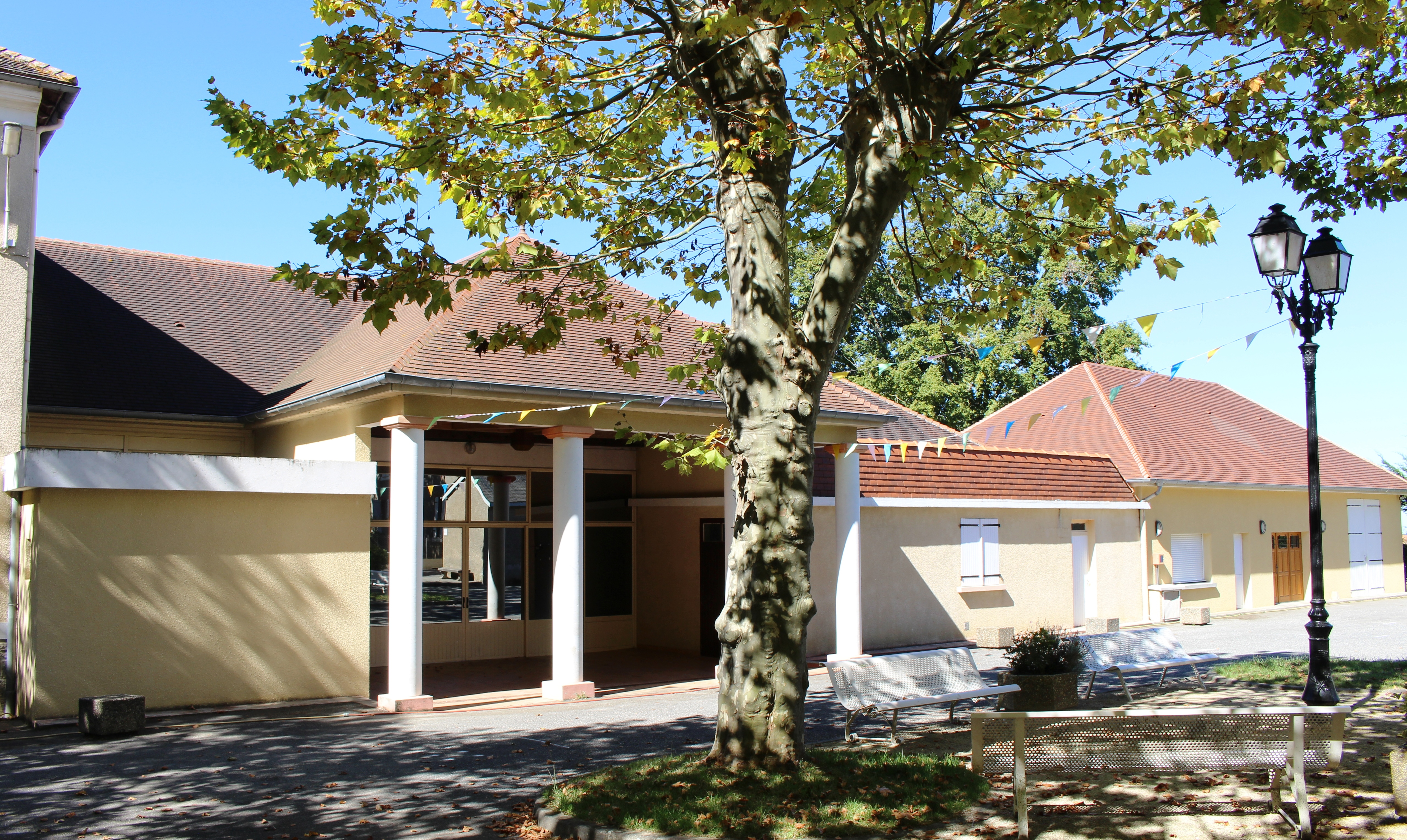 Salle des fêtes de Bernadets-Dessus (Hautes-Pyrénées)